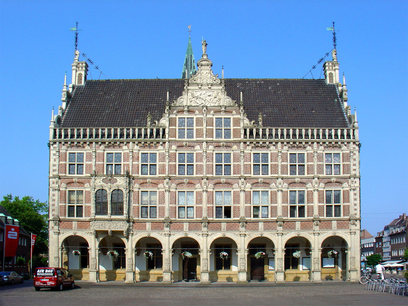 Oude renaissance raadhuis van Bocholt